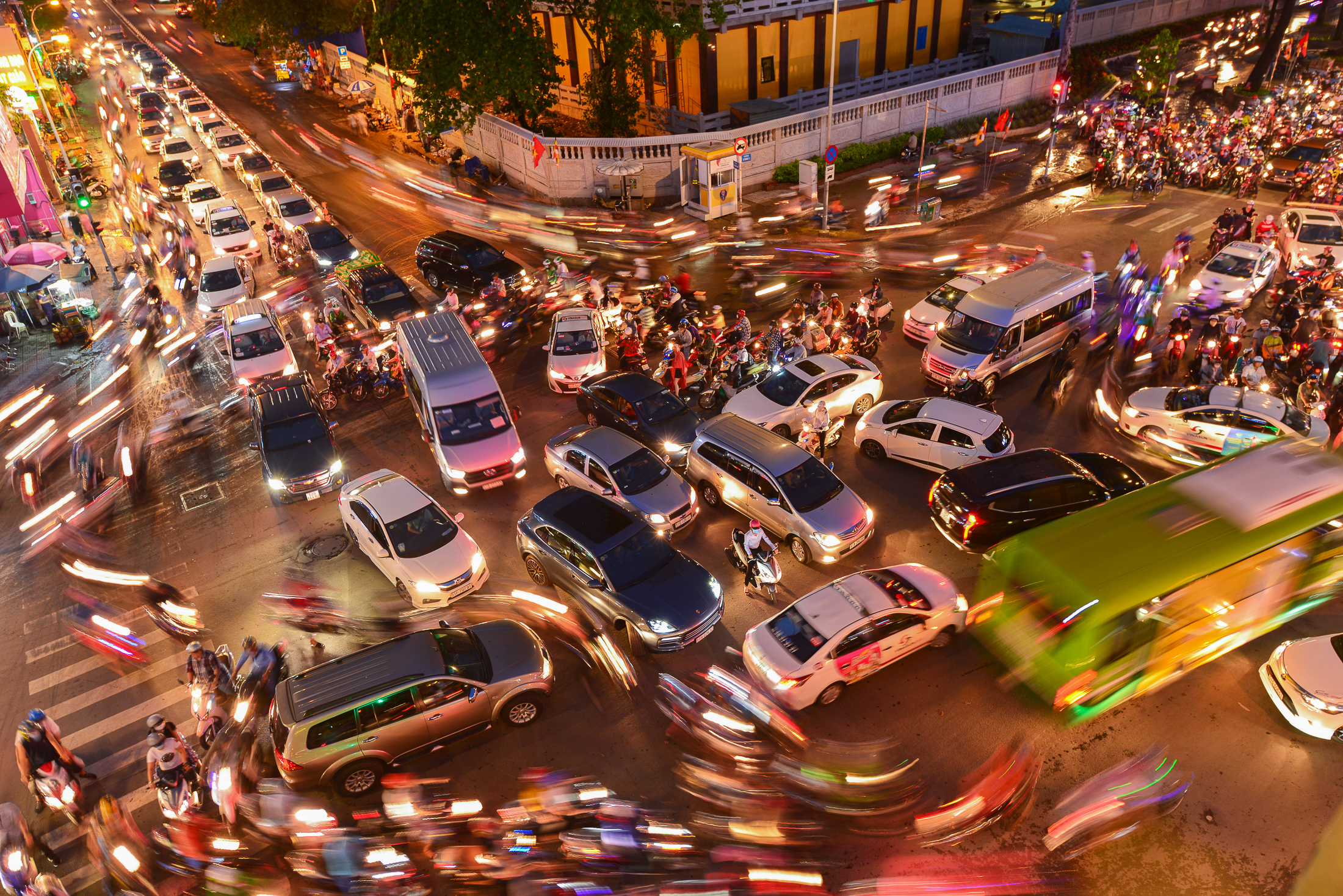 Miêu tả